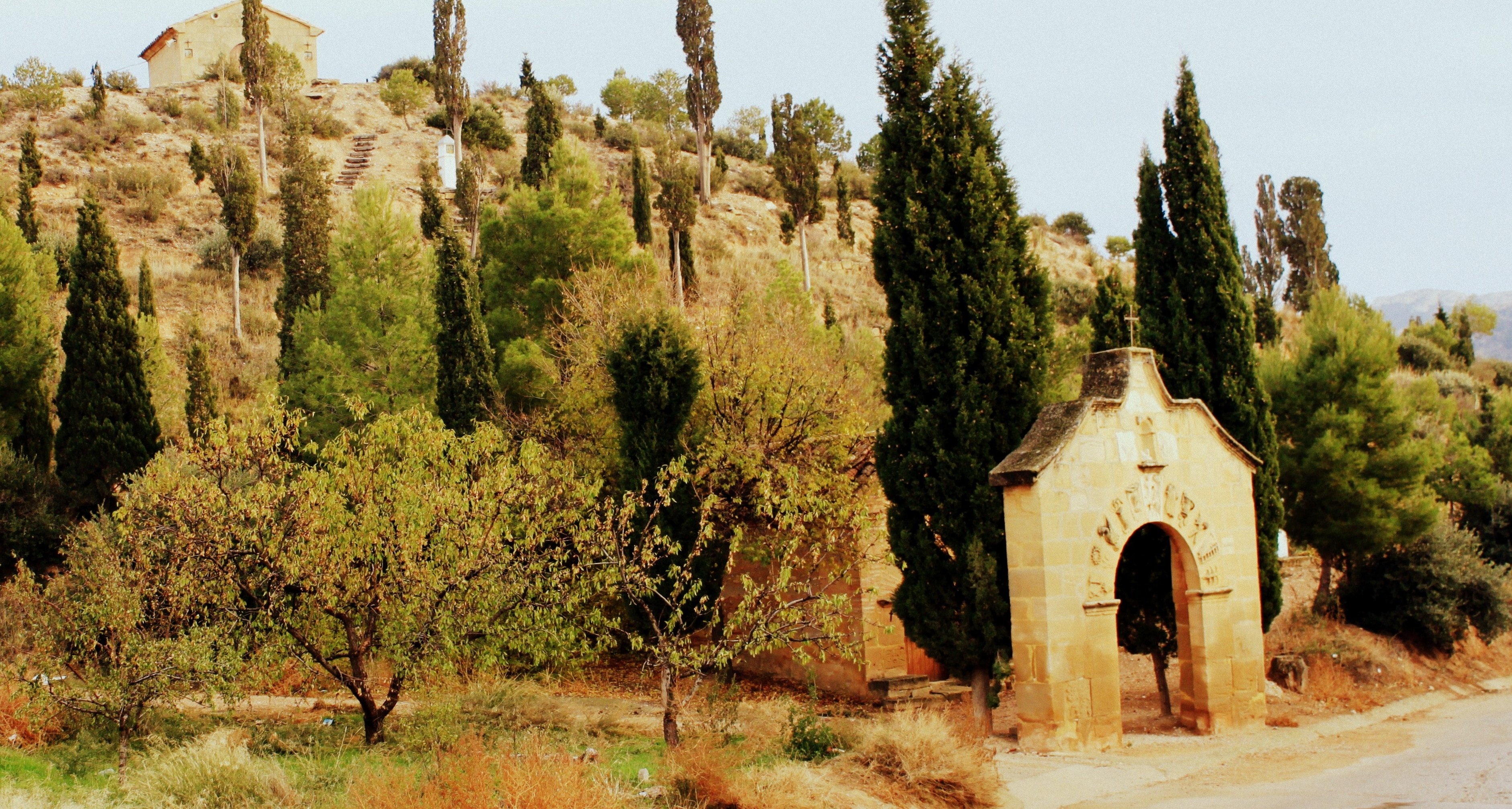 Monte Calvario de Calanda (Teruel): Pórtico de acceso